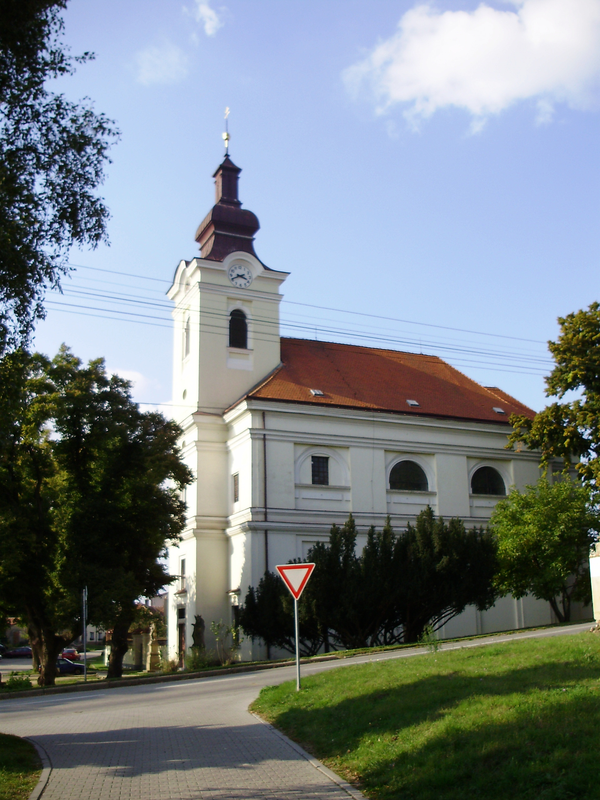 Farní kostel Nanebevzetí Panny Marie Bohdalice (Vyškov- Czech republic)